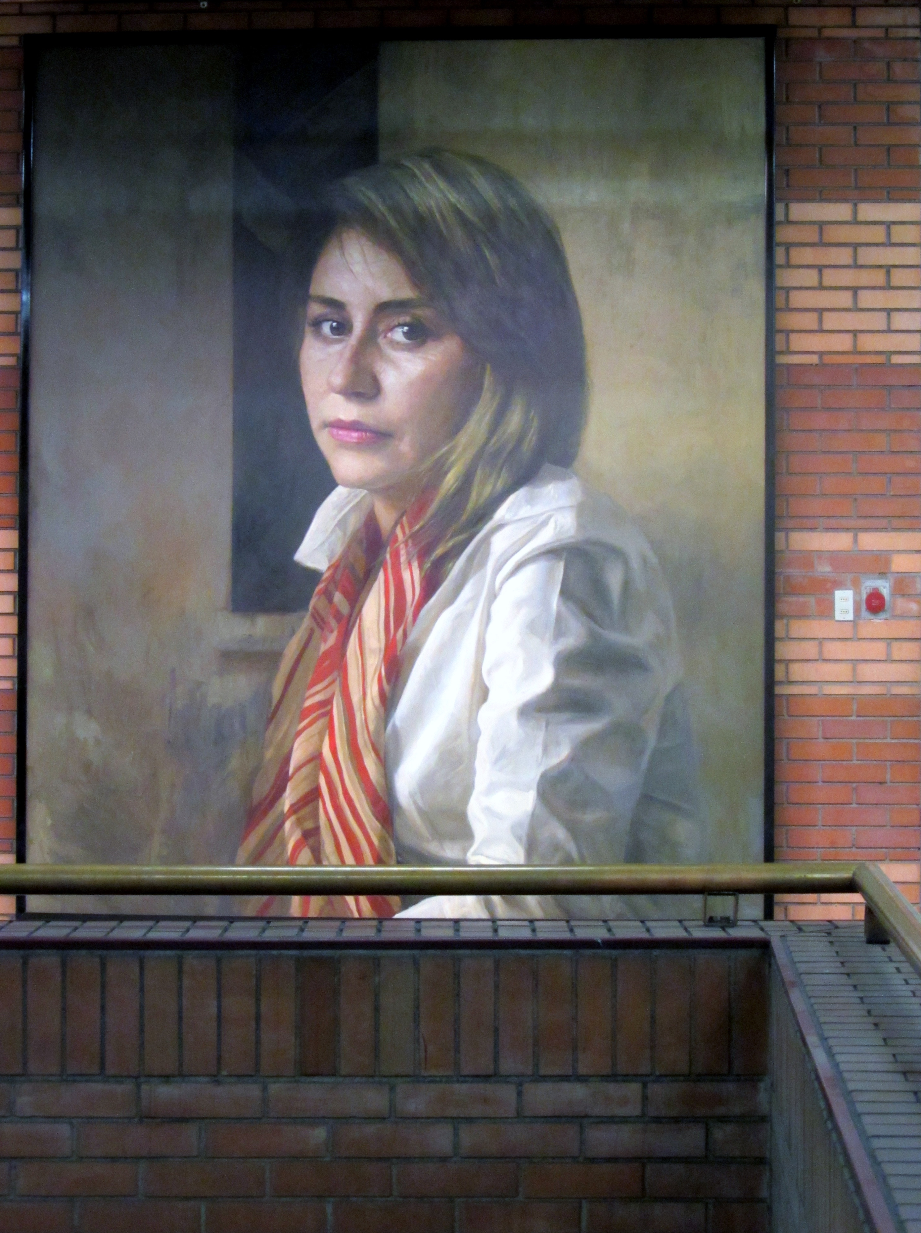 Retratos realizados por el pintor Guillermo Lorca en la estación de metro Baquedano, Santiago de Chile.